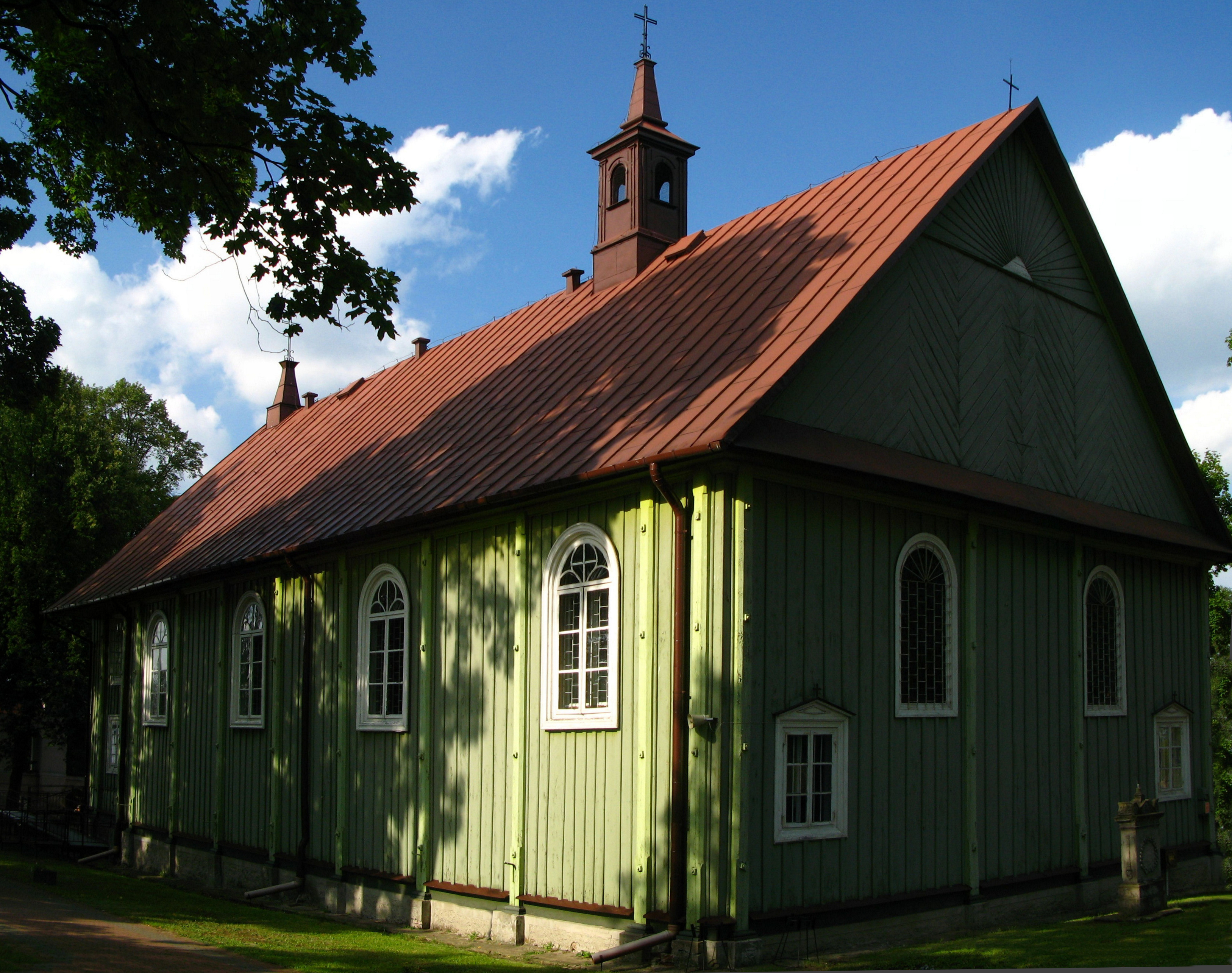 kościół par. p.w. św. Stanisława, drewn., 1816, dzwonnica i cmentarz kościelny w Sarnakach